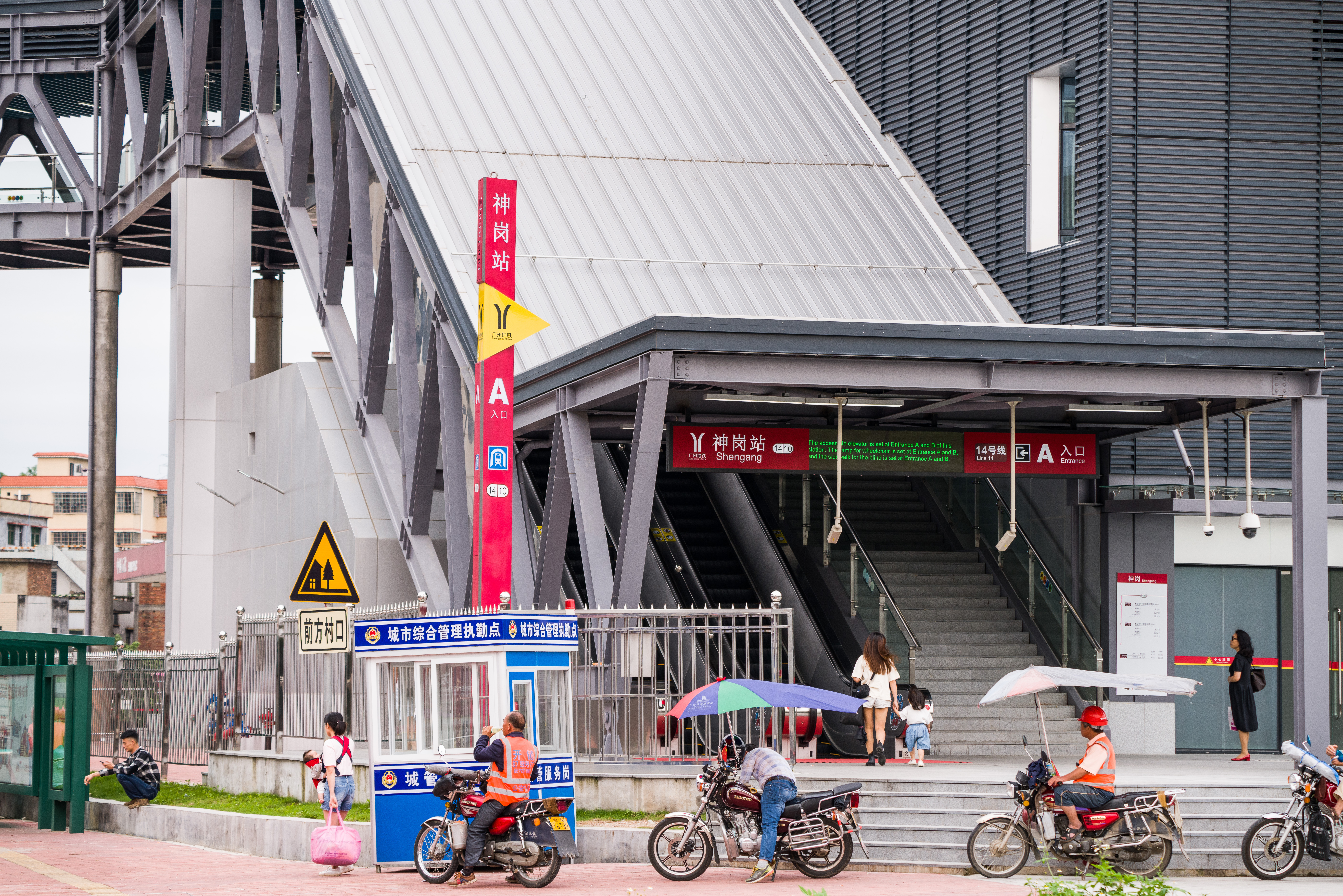 神岗站A出入口